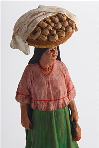 Estatueta de Serafin Marsal, representando uma figura popular, que é a vendedora de Chipa paraguaia.